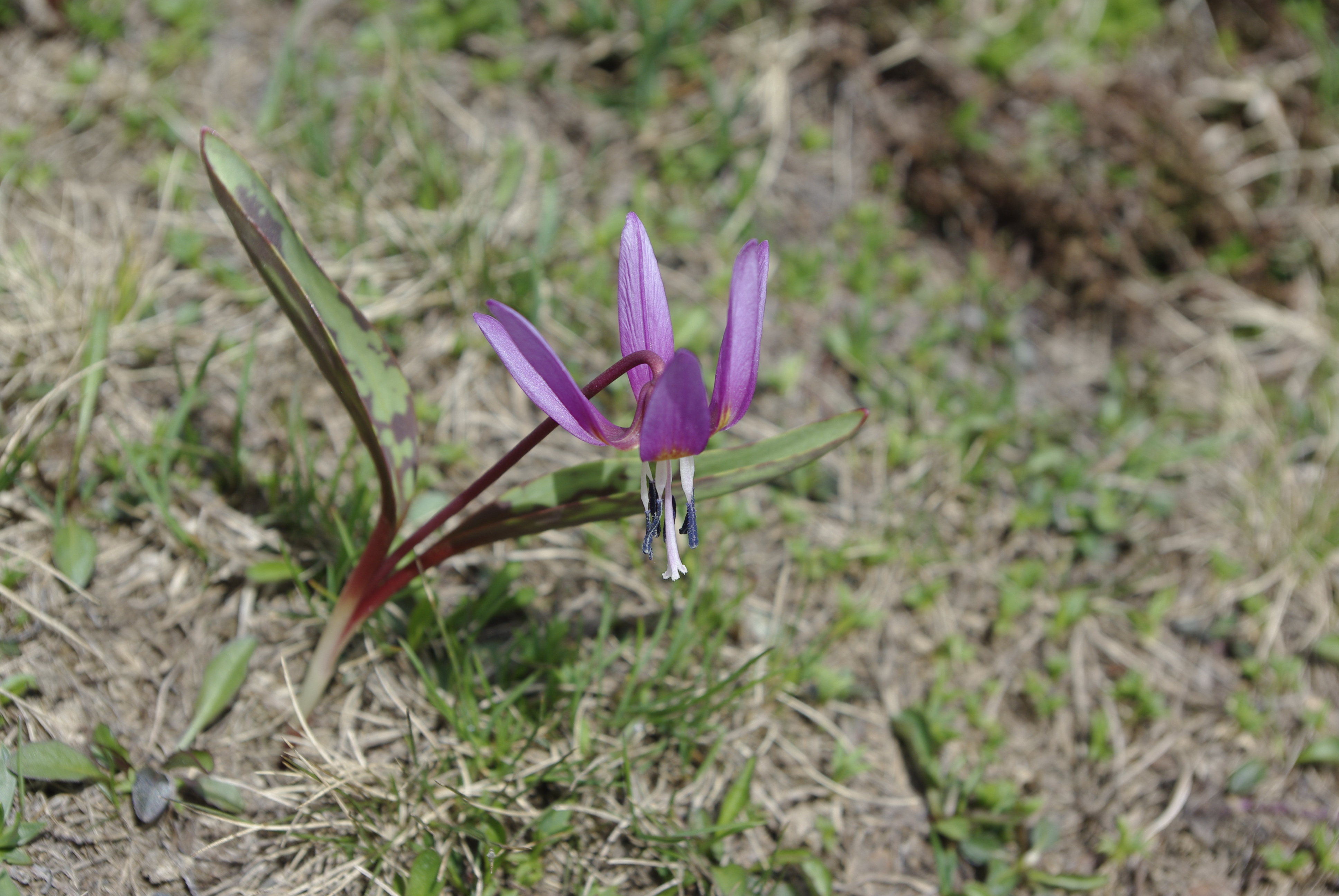 En el valle de Benasque This is a photography of a Special Area of Conservation in Spain with the ID: ES0000149. Natura2000 entry, EEA entry